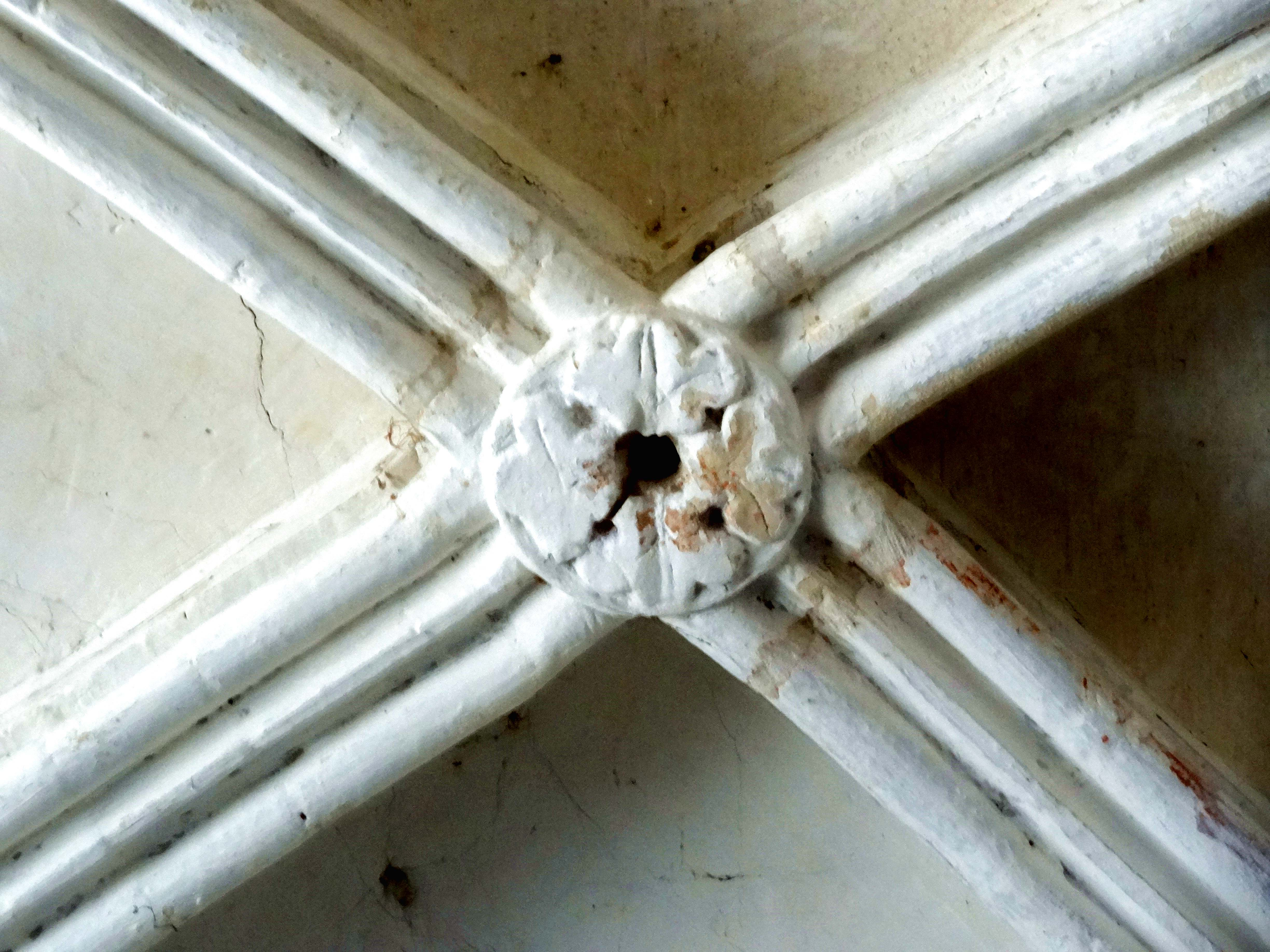 Clé de voûte - voir titre.